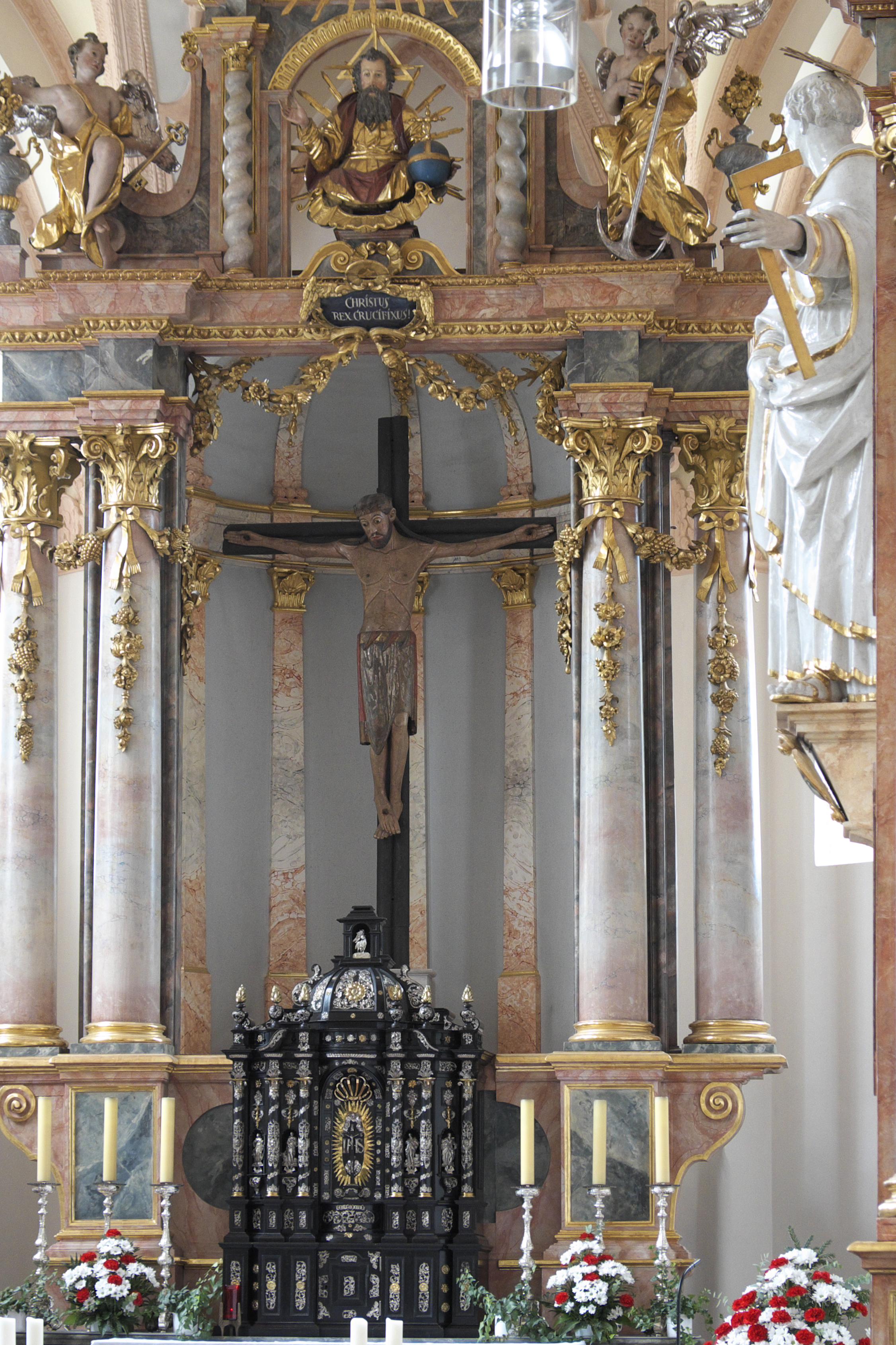 Katholische Pfarrkirche Heilig Kreuz im Stadtteil Forstenried im Stadtbezirk Thalkirchen-Obersendling-Forstenried-Fürstenried-Solln in München (Bayern/Deutschland), romanisches Holzkruzifix, um 1170